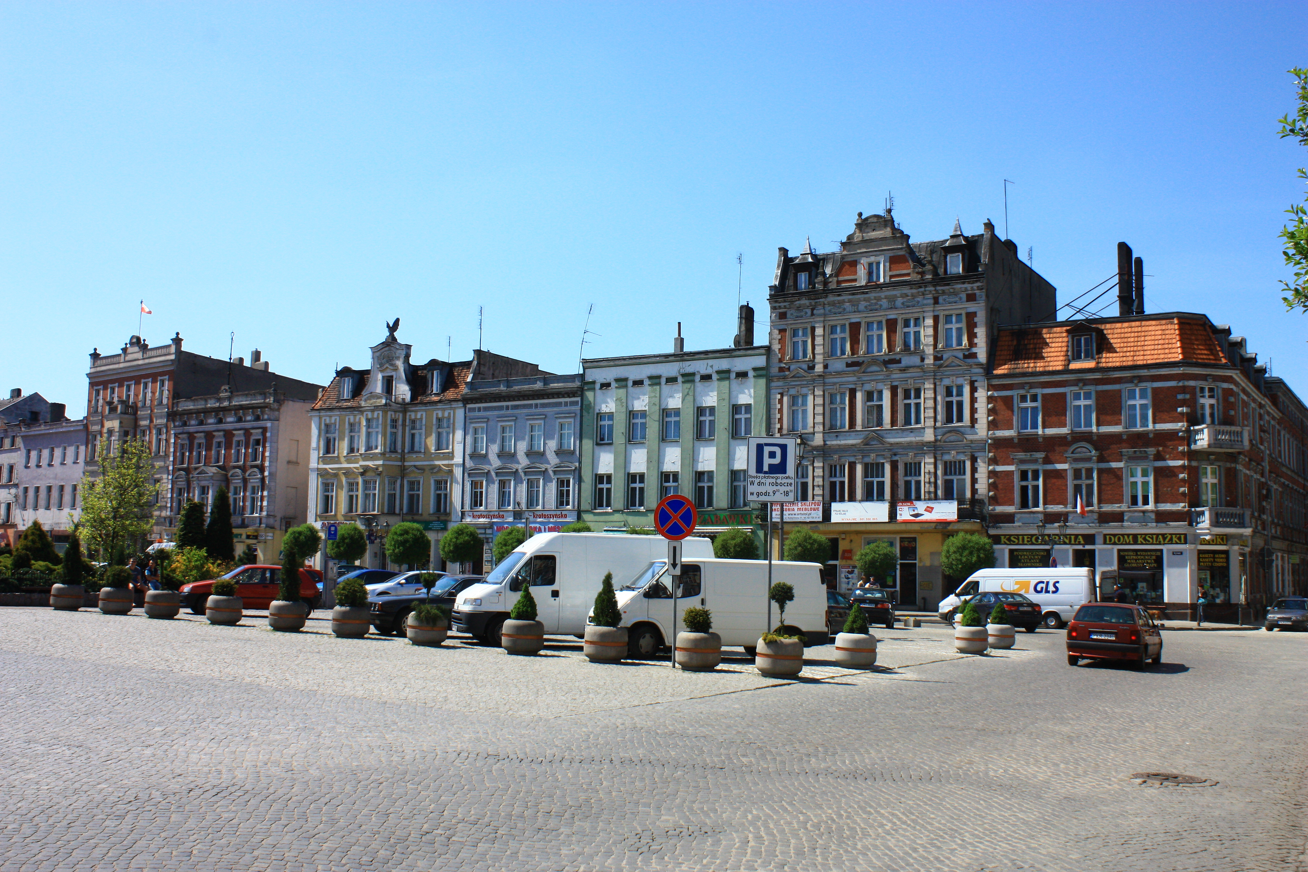 Krotoszyn, historyczny układ urbanistyczny, XV, pocz. XX